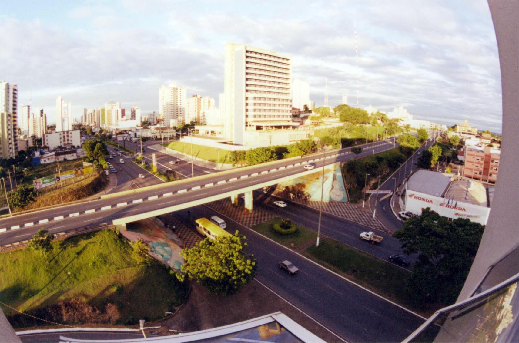 Cuiaba, BrasileCuiabá